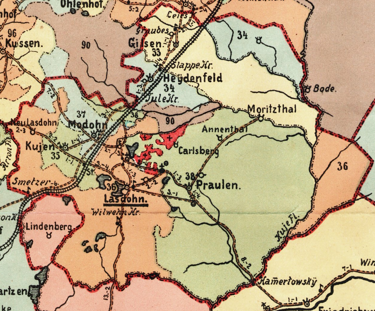 Lazdona kihelkonna mõisad 1903. aasta kaardil.